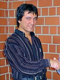 Saidali Yuldashev, Gratulation zum Sieg beim Open 1998 in Recklinghausen.